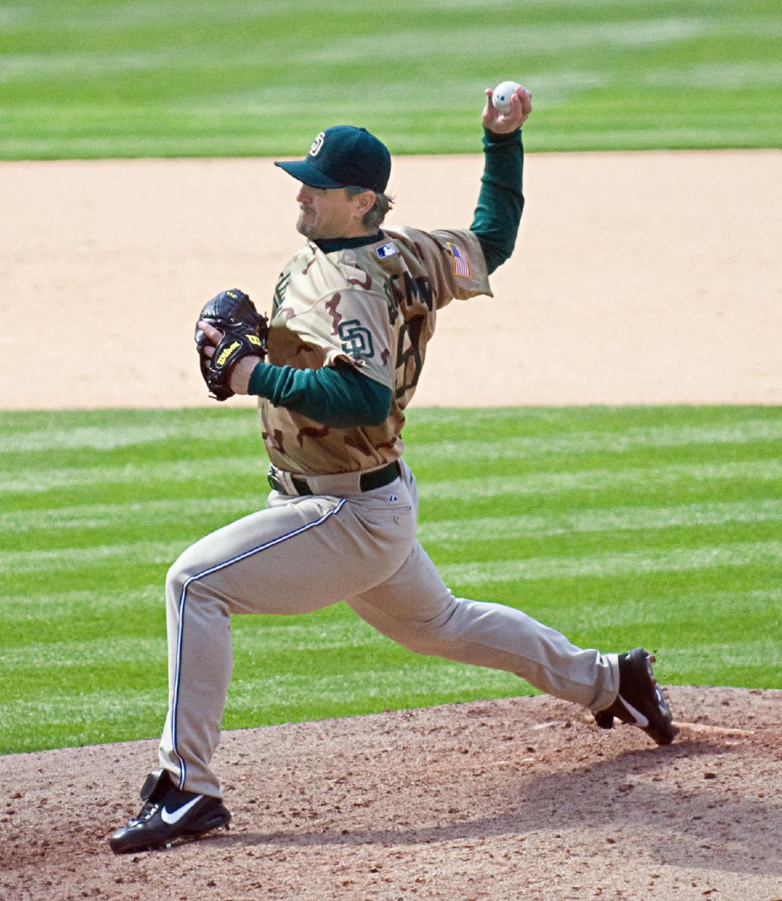 Trevor Hoffman